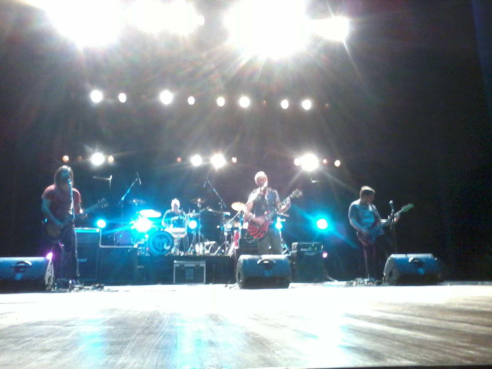 Chancho Va en vivo.